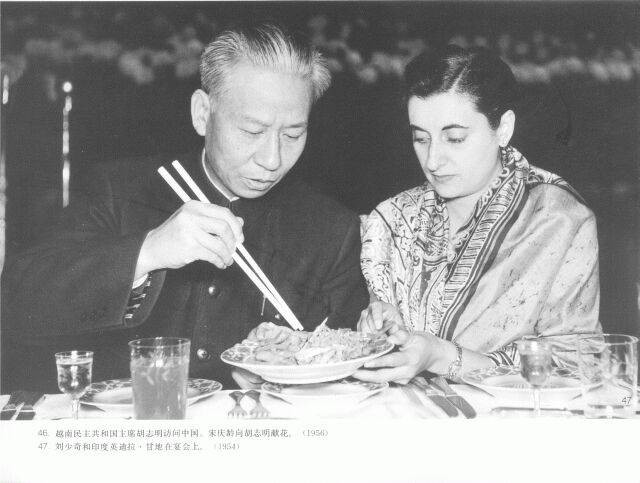 1954年，刘少奇和印度英迪拉·甘地在宴会上